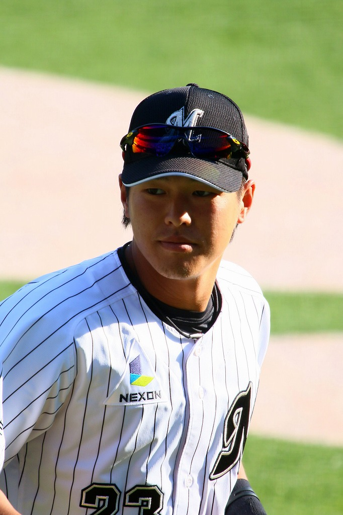 日本プロ野球 千葉ロッテマリーンズ 中村奨吾内野手